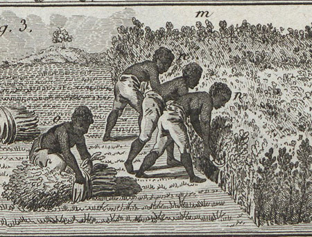 Récolte de l'indigo. Encyclopédie ou dictionnaire raisonné des sciences des arts et des métiers par Diderot et d'Alembert. Edition Briasson, Paris, 1751.